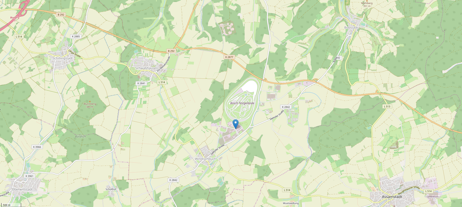 Lage des Industriegebiets und Wohnplatzes Gewerbegebiet Am Seehof auf der Gemarkung von Windischbuch (Boxberg)